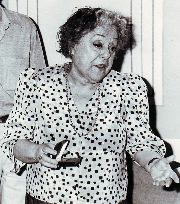 La actriz española Rafaela Aparicio en la entrega de la Fiambrera de Plata de 1987.